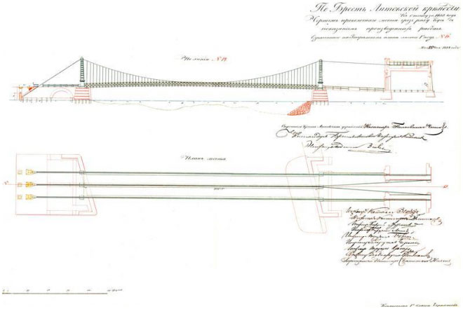 Праект Цярэспальскай брамы, 1854 г.